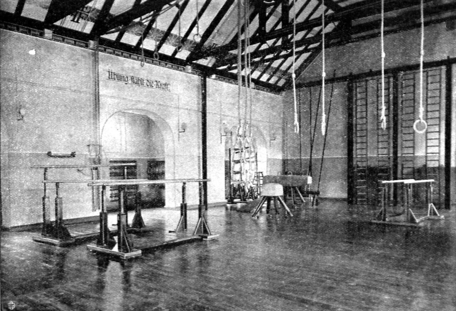 Turnhalle des Lehrerseminars und der Übungsschule in Lübeck